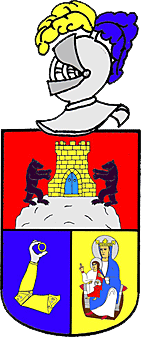 Escudo del Lugar de Motos, Alustante, Guadalajara.